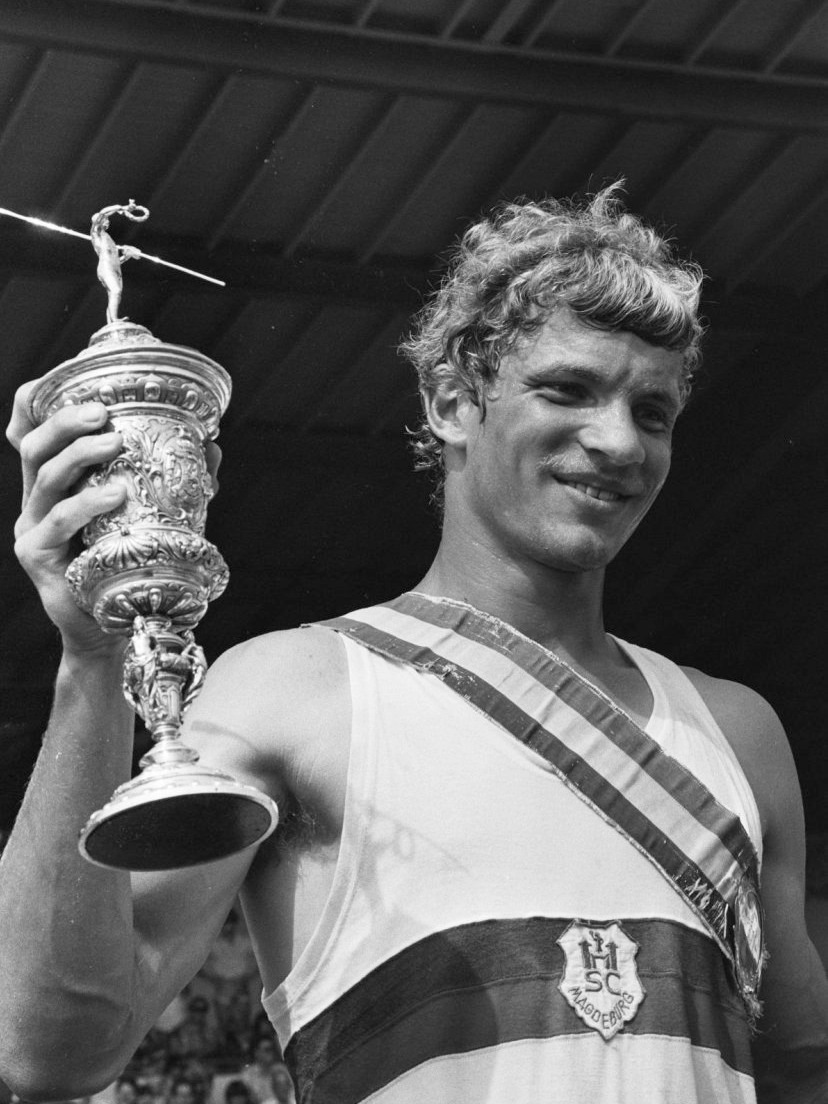 Roeien, Holland Beker ; winnaar Mund (DDR) met beker